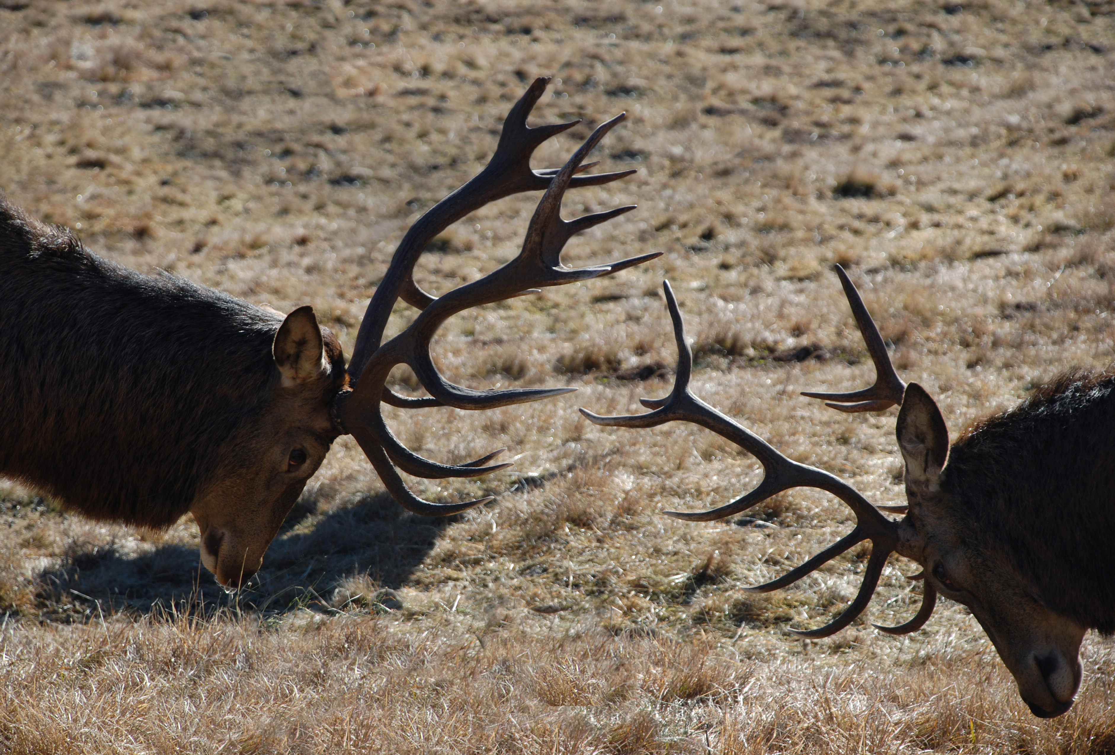 Cervi a Paneveggio ph Carlo A.Turra